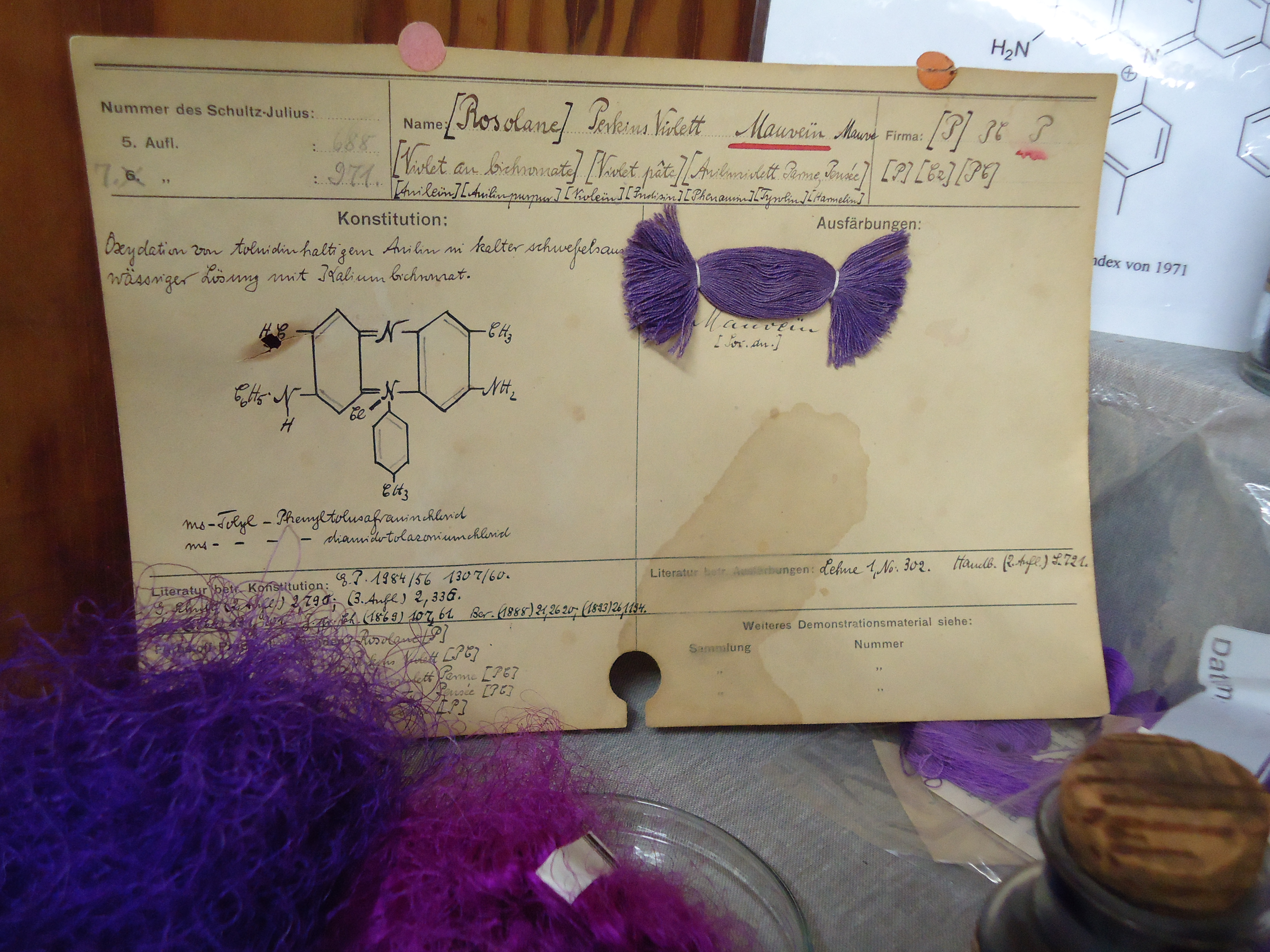 Blick in die Historische Farbstoffsammlung der TU Dresden (Historische Farbstoffsammlung der TU Dresden)